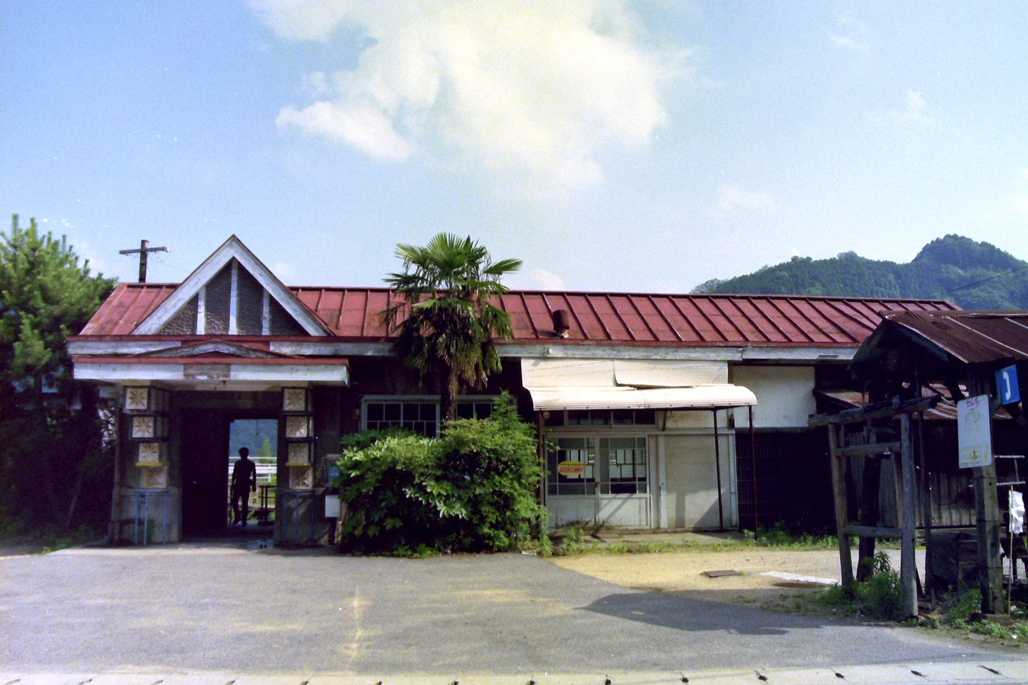 旧同和鉱業片上鉄道備前塩田駅本屋、1992年7月撮影